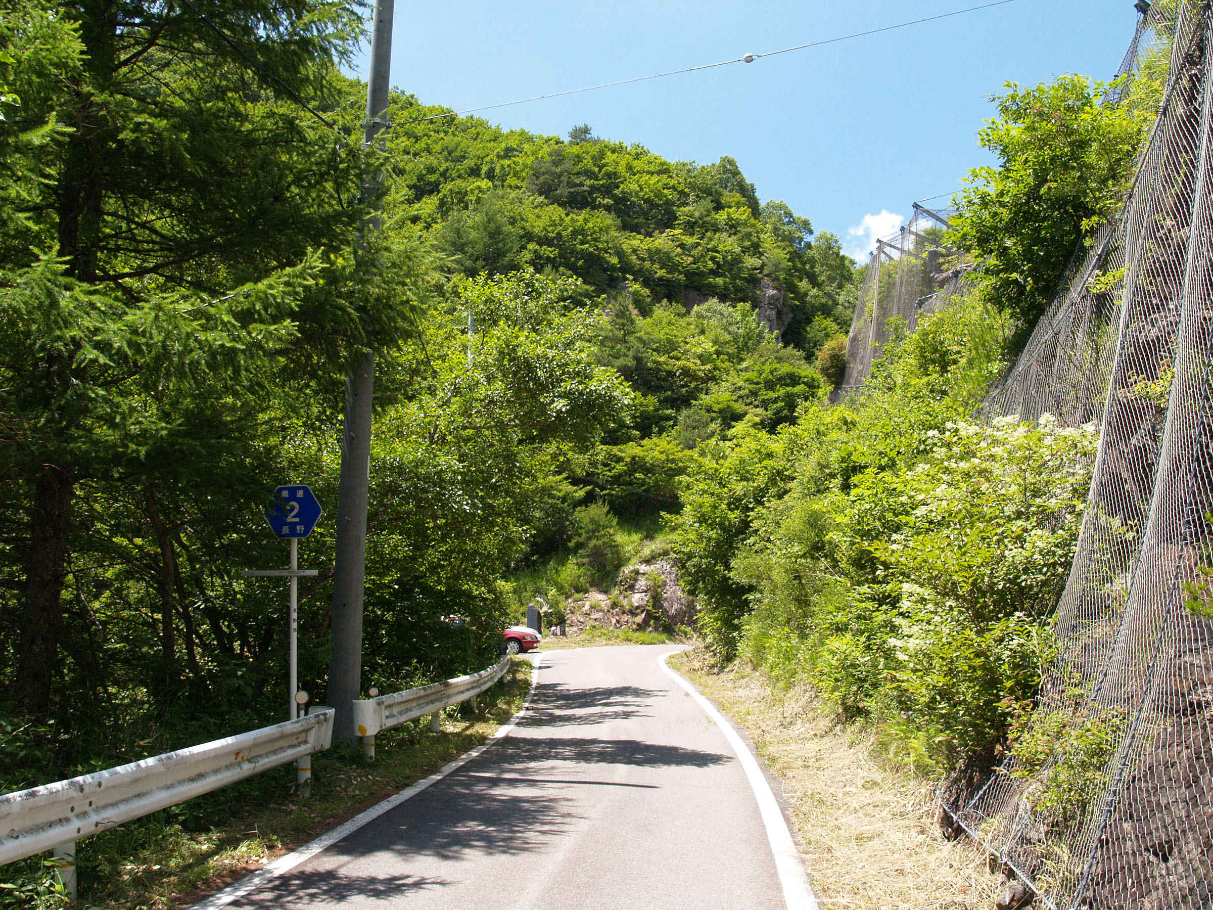 長野県道2号川上佐久線（馬越峠付近）